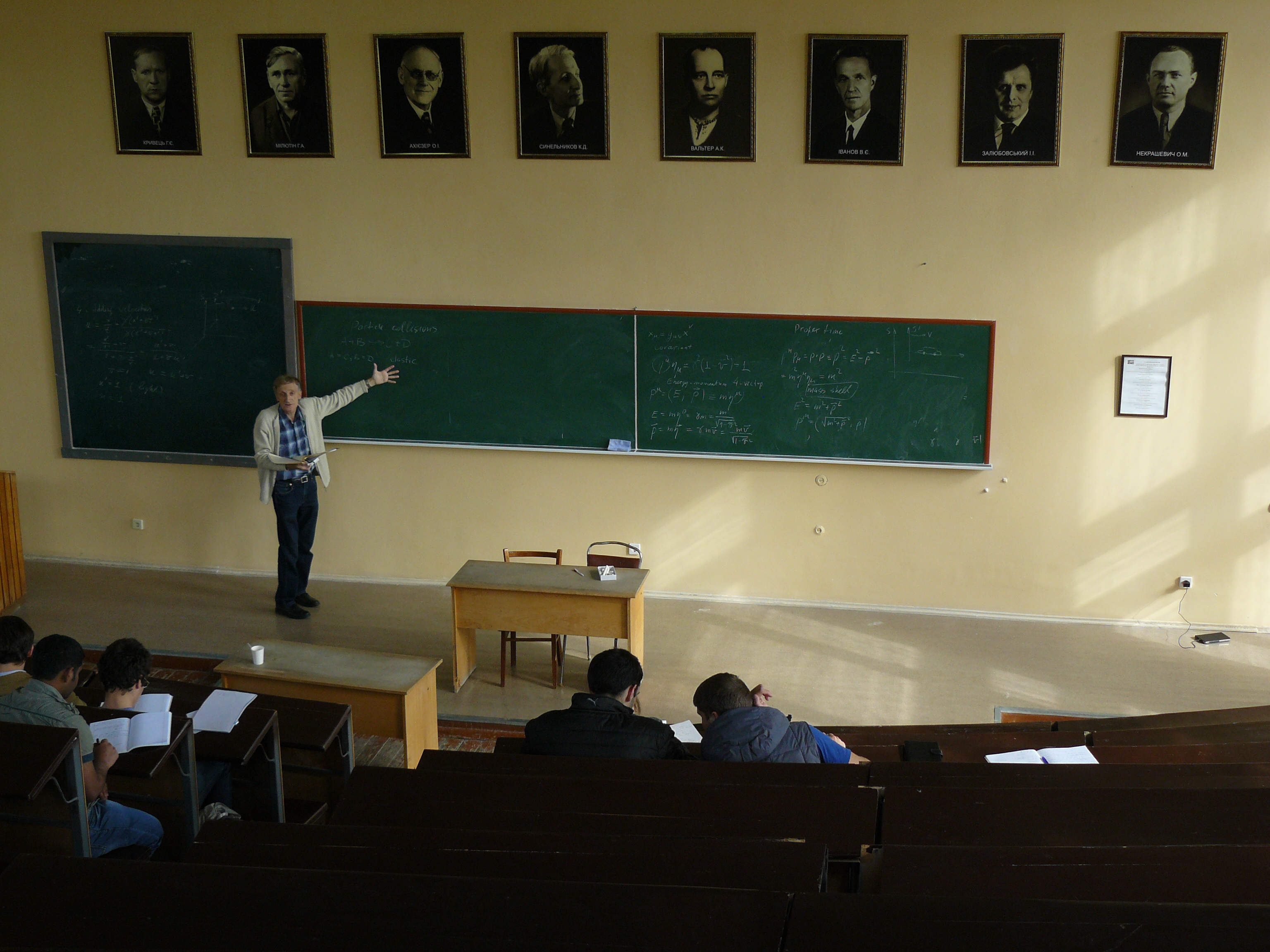 Лекция А.Ю. Корчина по элементарным частицам для 2 групп 4-го курса в аудитории №301 (им. Залюбовского)